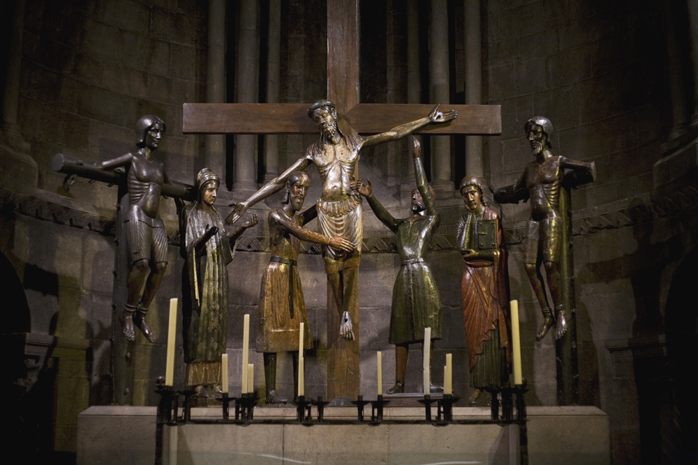 Monestir de Sant Joan de les Abadesses al Ripollès